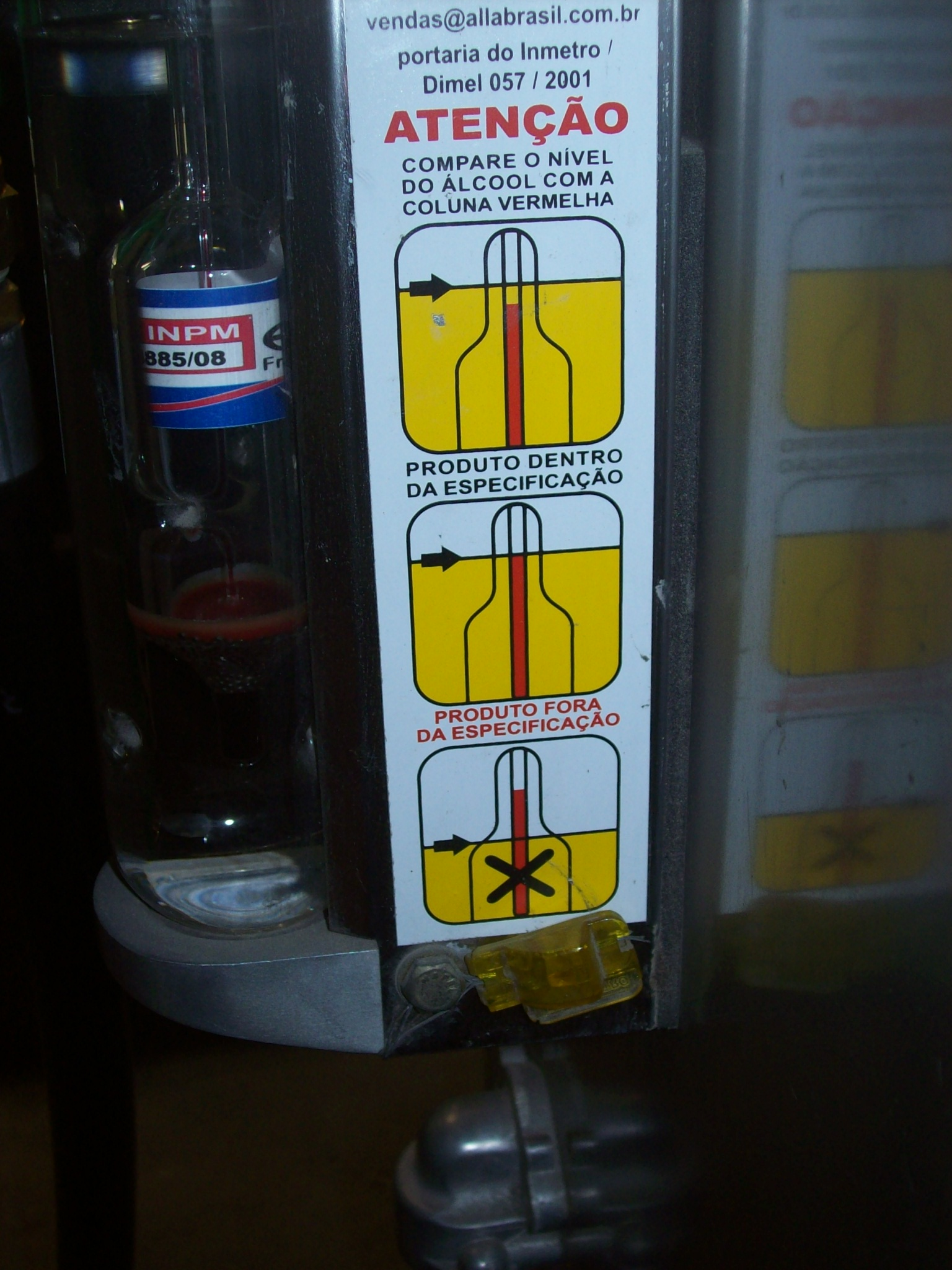 Escala que mede a porcentagem de álcool presente no combustível.